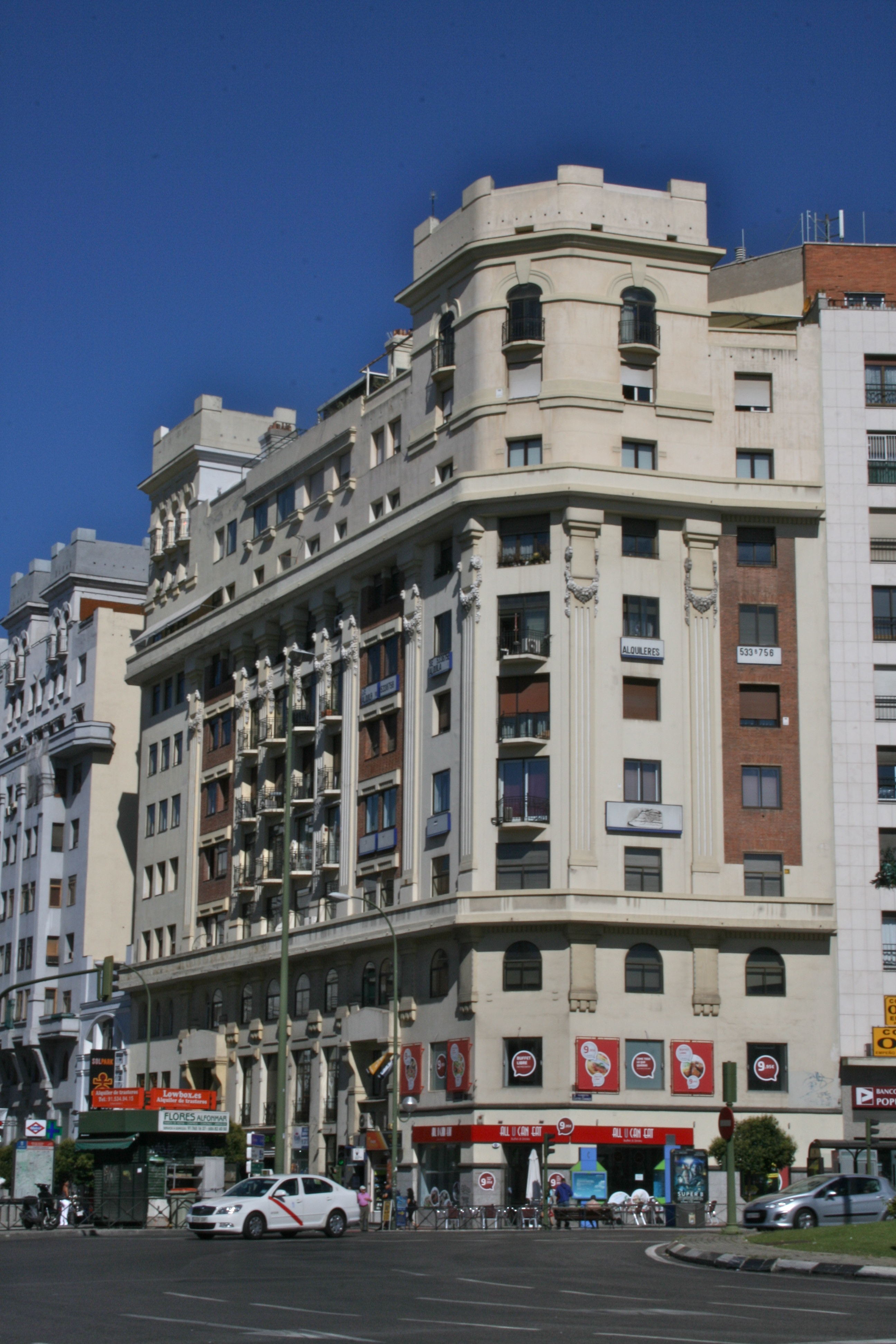 Edificios Titanic - Glorieta Cuatro Caminos (Madrid)